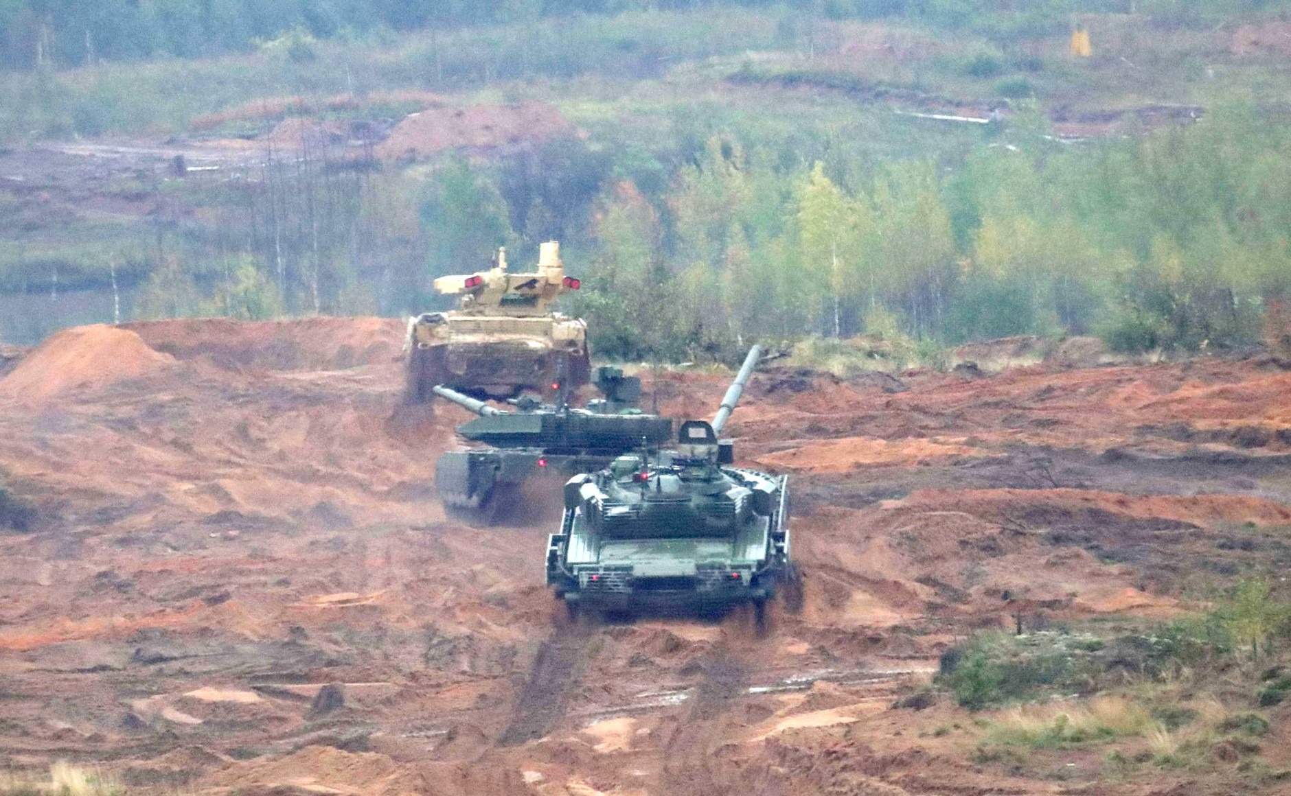 Совместные российско-белорусские стратегические учения «Запад-2017».